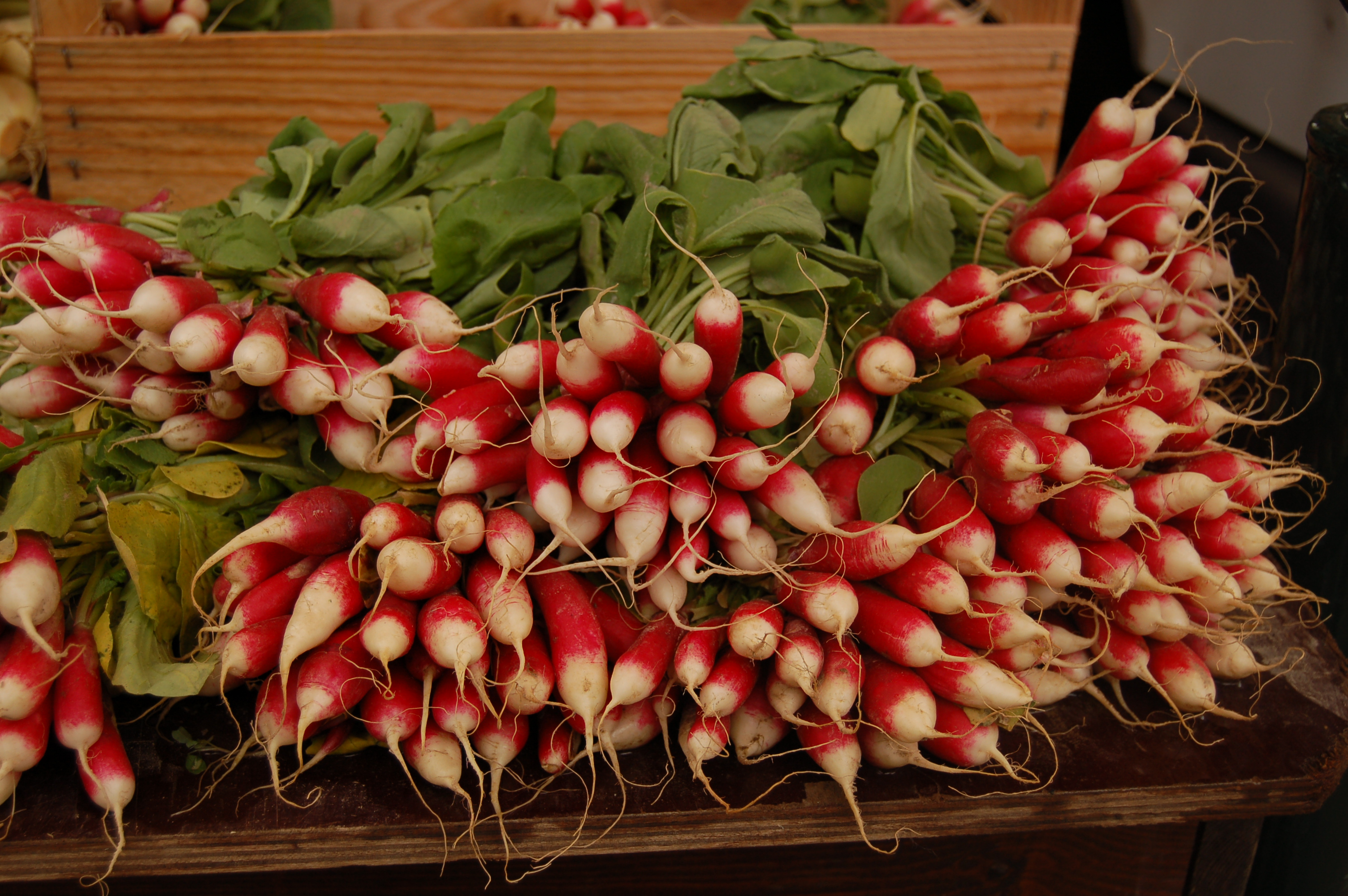 Radis Prise à Toulon (France) Avril 2007